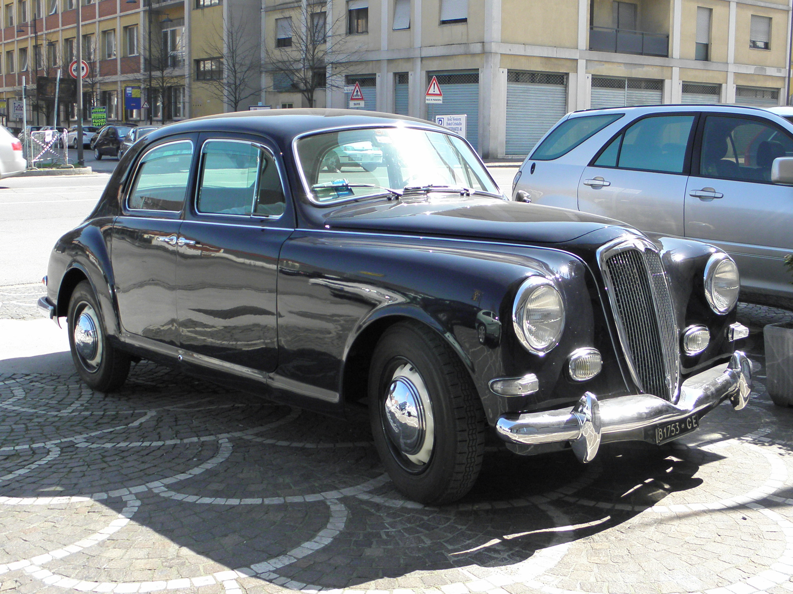 Lancia Aurelia B12 fotografata a Rovigo in Via Porta Adige.